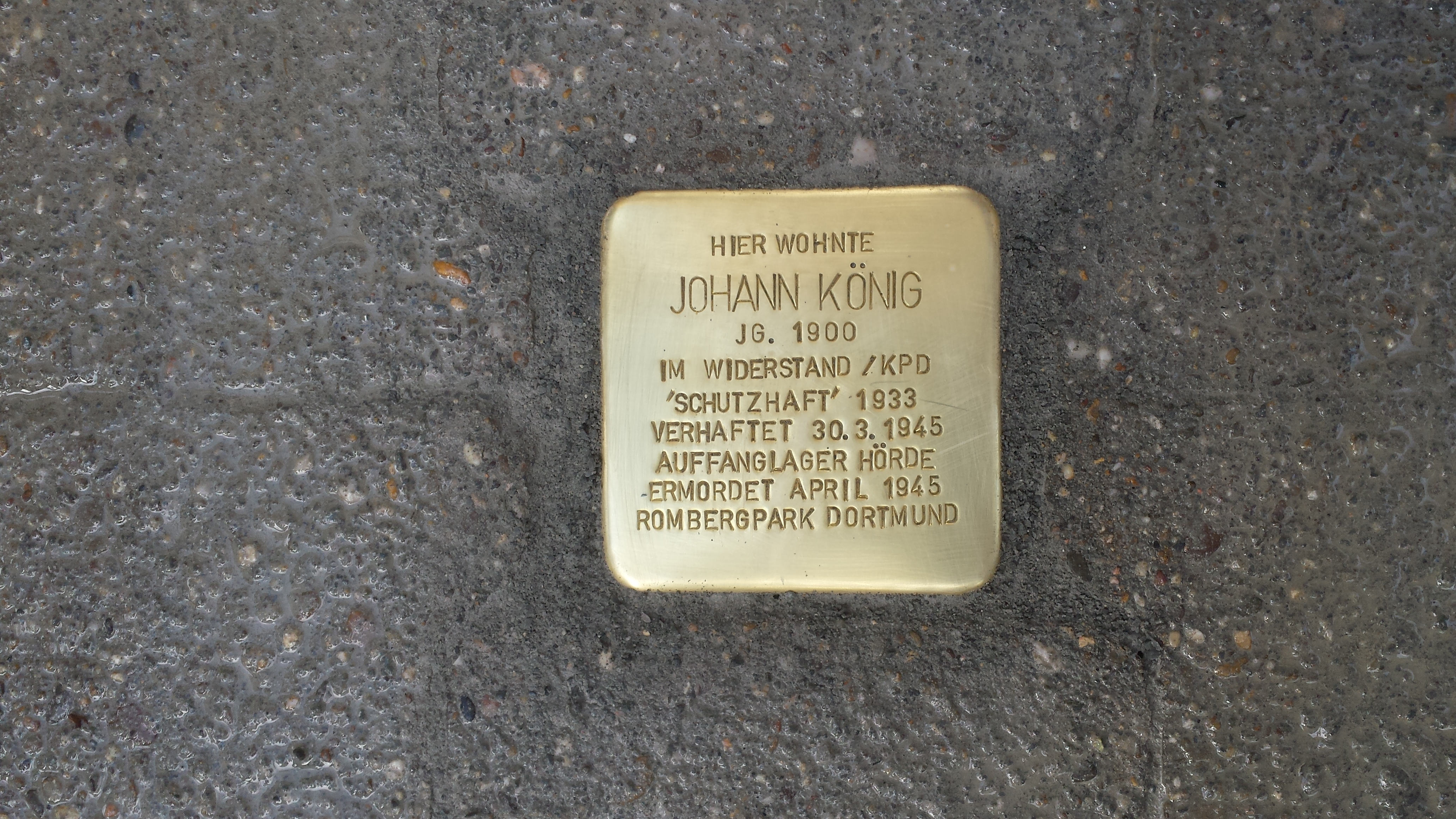 Johann König, 2019